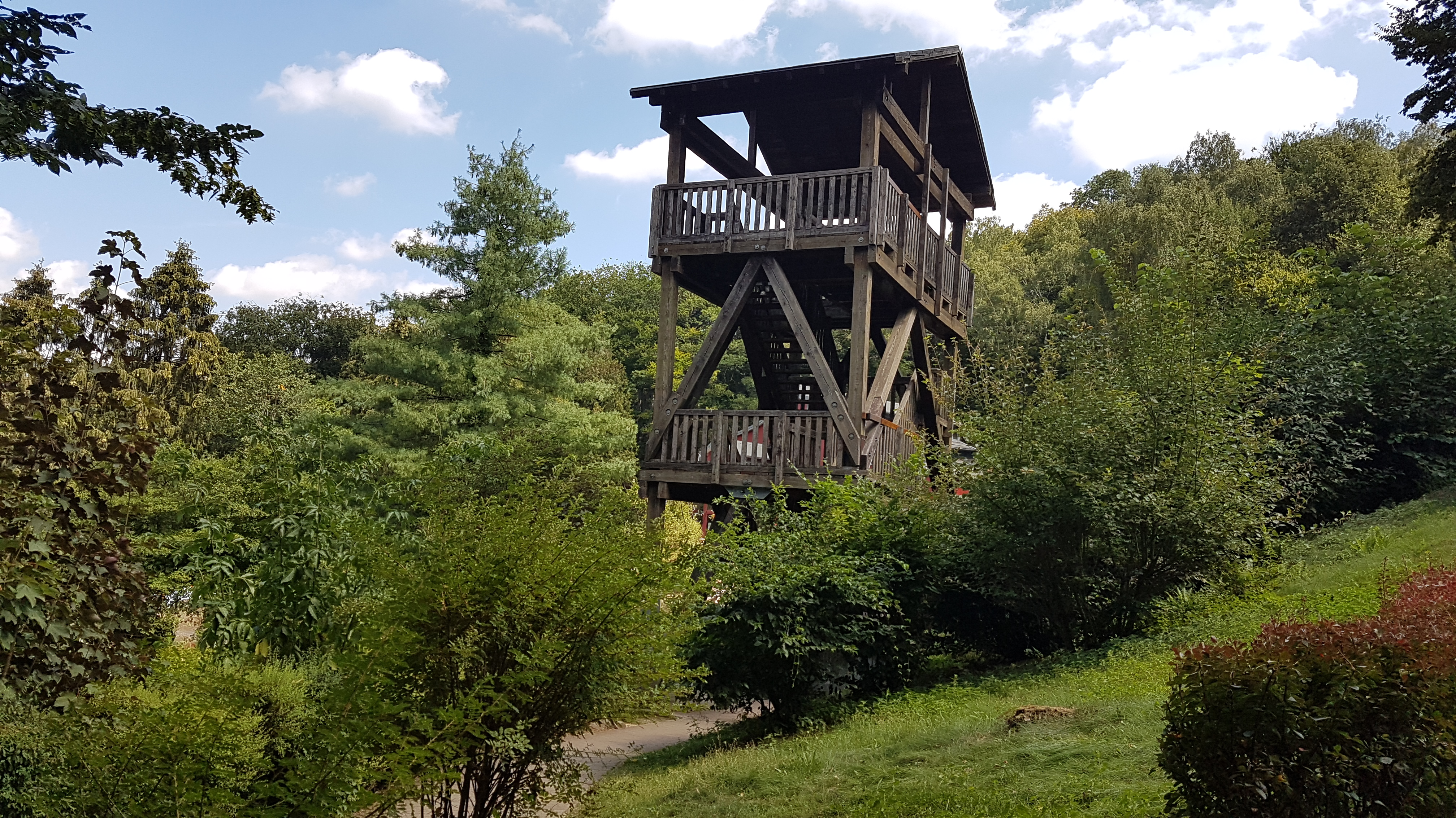 Der Aussichtsturm im Zoo Neunkirchen, Elefantenturm genannt